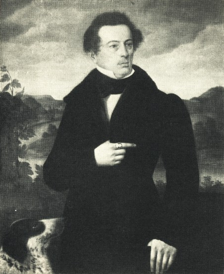 Portrait von Ernst von Schiller